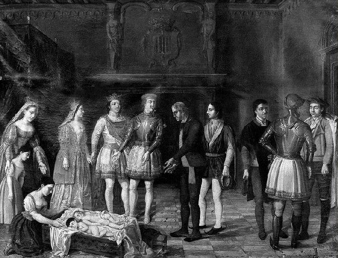 "Envoyés béarnais choisissant leur vicomte chez le seigneur de Moncade et prenant celui des deux jumeaux qui dormait les mains ouvertes". Illustration de la légende des Fors de Béarn.